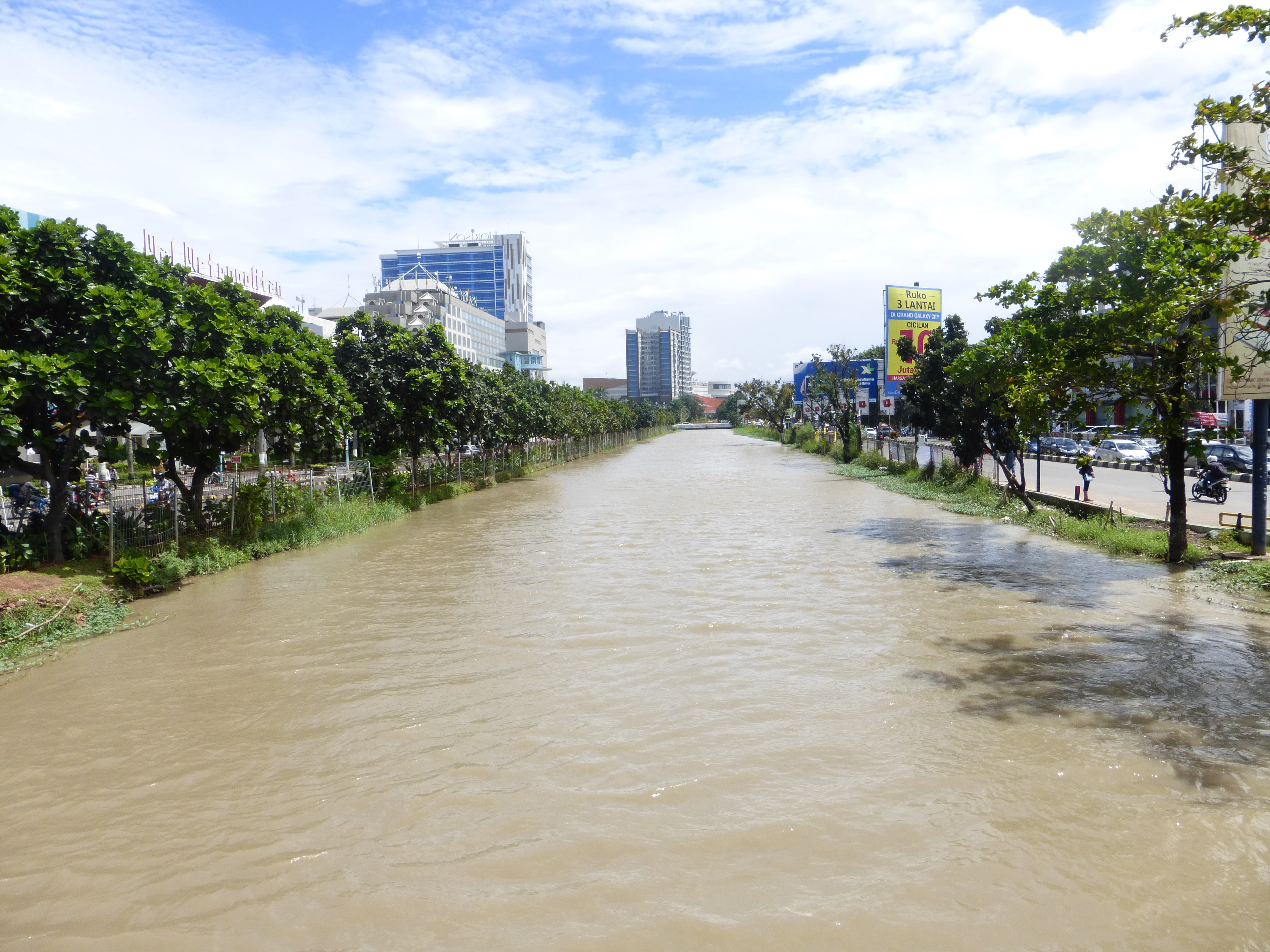 Saluran Kalimalang